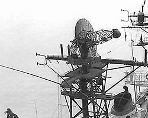 Антенный пост радара AN/SPS-8B на ракетном крейсере CLG-6 «Провиденс», 12.07.1970